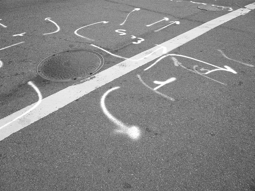 Iconic Sketches, artistic intervention/künstlerische Intervention, scene/Szene, New York City, 1995, Ruediger John